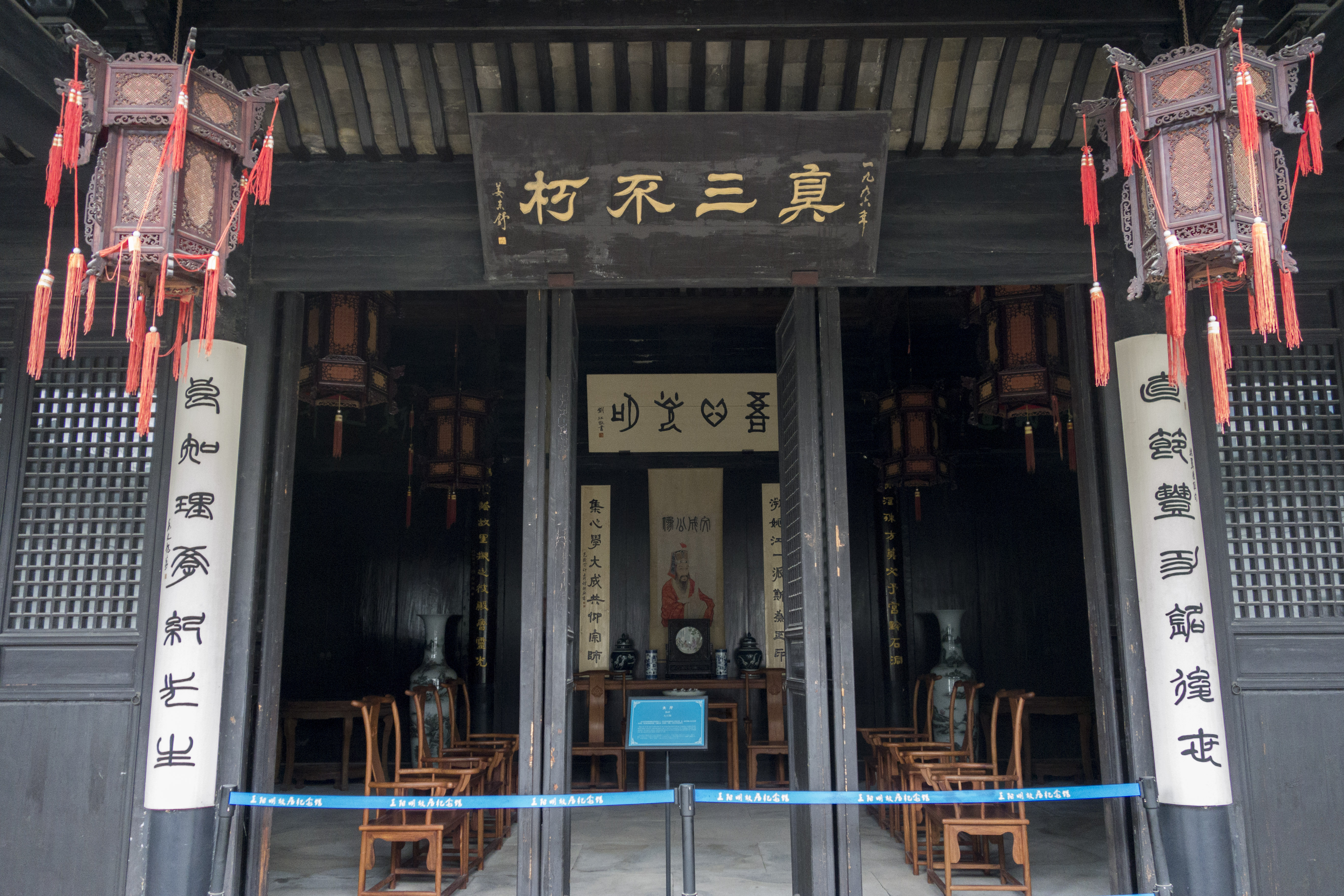 王守仁故居大厅